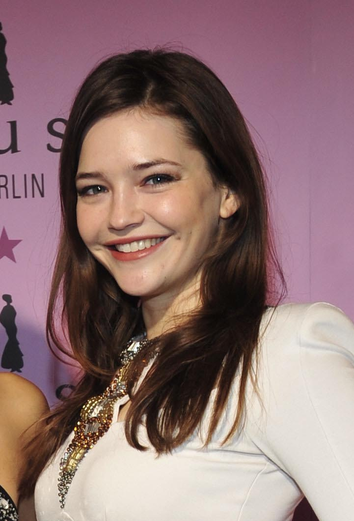 Arissa Ferkic Foto: SCHROEWIG/Eva Oertwig.